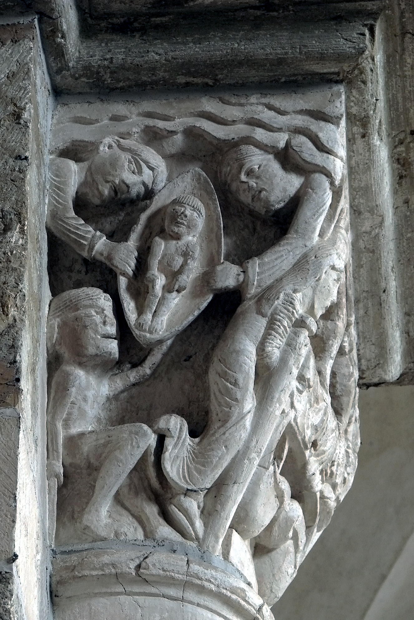 Chapiteau de la nef (2ème moitié du 12ème siècle), 4ème pile côté Sud: la mort de Lazare (le personnage de la parabole de l'évangile de Luc, et non celui ressuscité par Jésus); l'âme de Lazare monte au ciel dans une mandorle, accueillie par deux anges. Basilique Sainte-Marie-Madeleine de Vézelay.